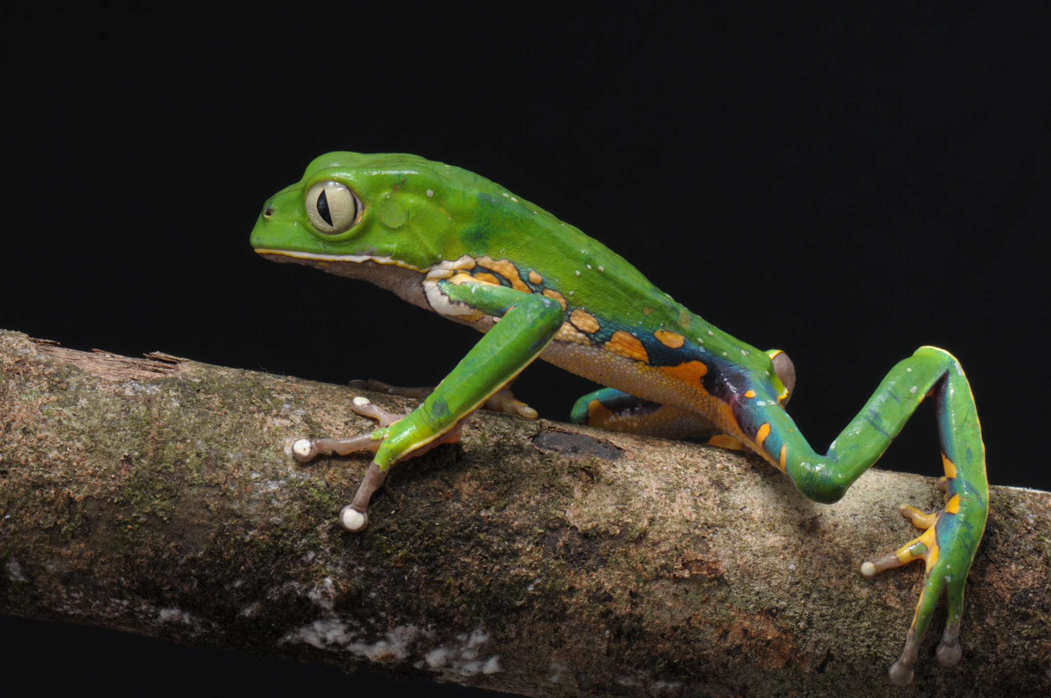 Perereca- macaco - Phyllomedusa bahiana, espécie arborícola de tamanho médio encontrada na Bahia.